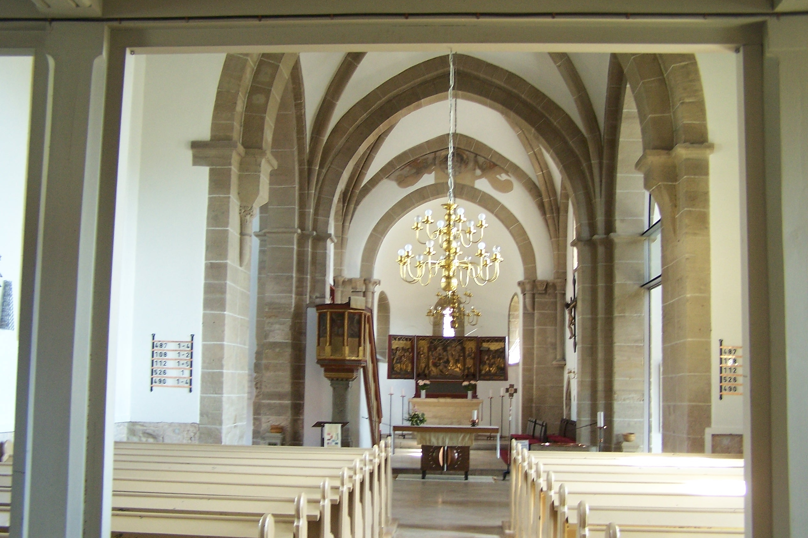 Ansichten und Details der romanischen Stadtpfarrkirche St.-Bonifatius in der Altstadt von Treffurt.